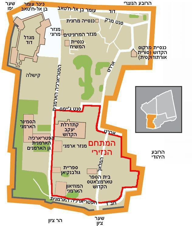 Jerusalem_Armenian_Quarter